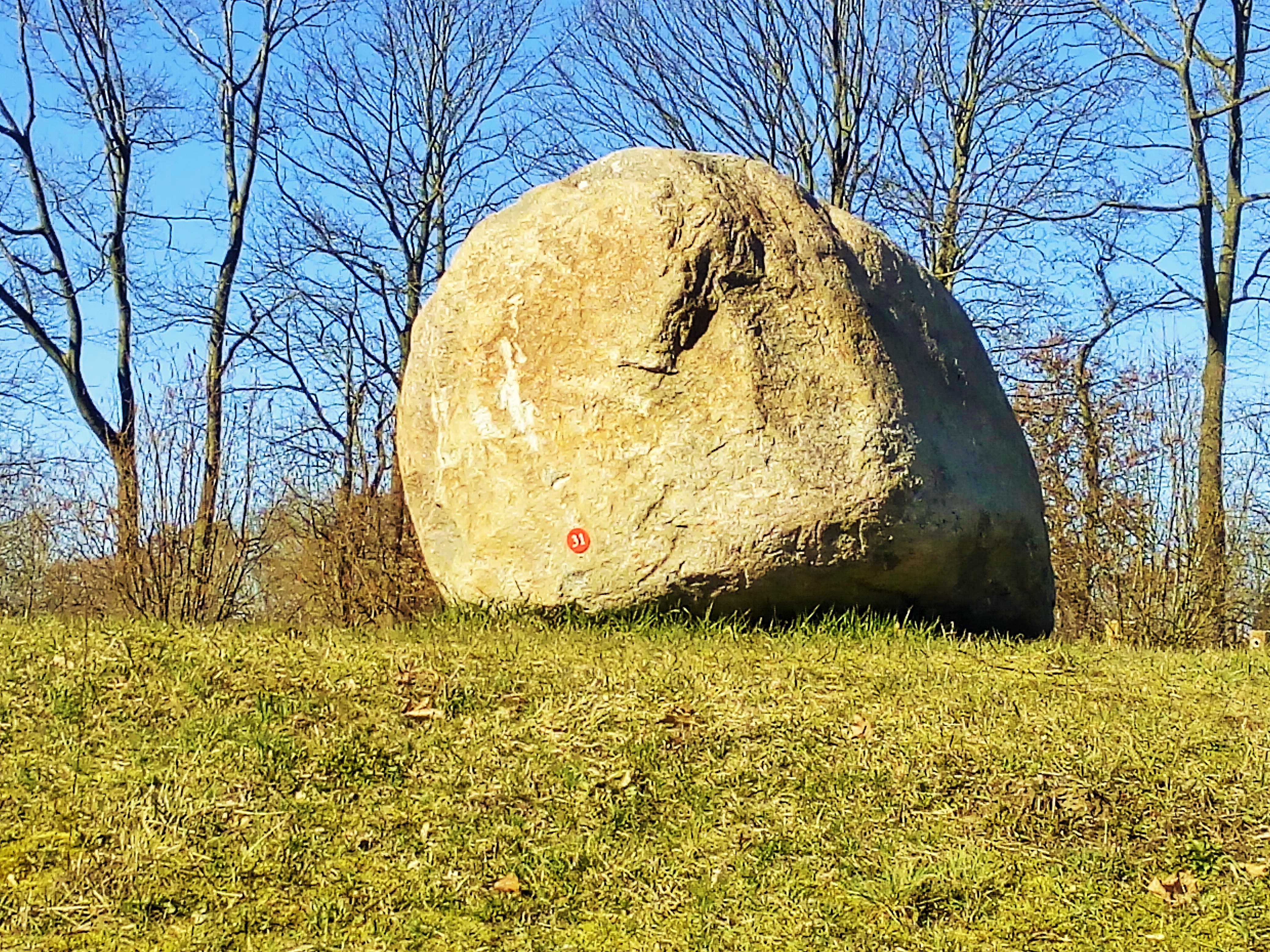 Dieser 18 Tonnen schwere Findling in Zitterpenningshagen besteht aus Granit und kam mit der letzten Eiszeit hierher.